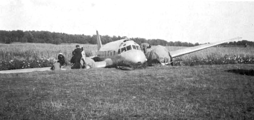 Ryskt flygplan nödlandade på Skarpnäcksfältet i slutet av 1930-talet